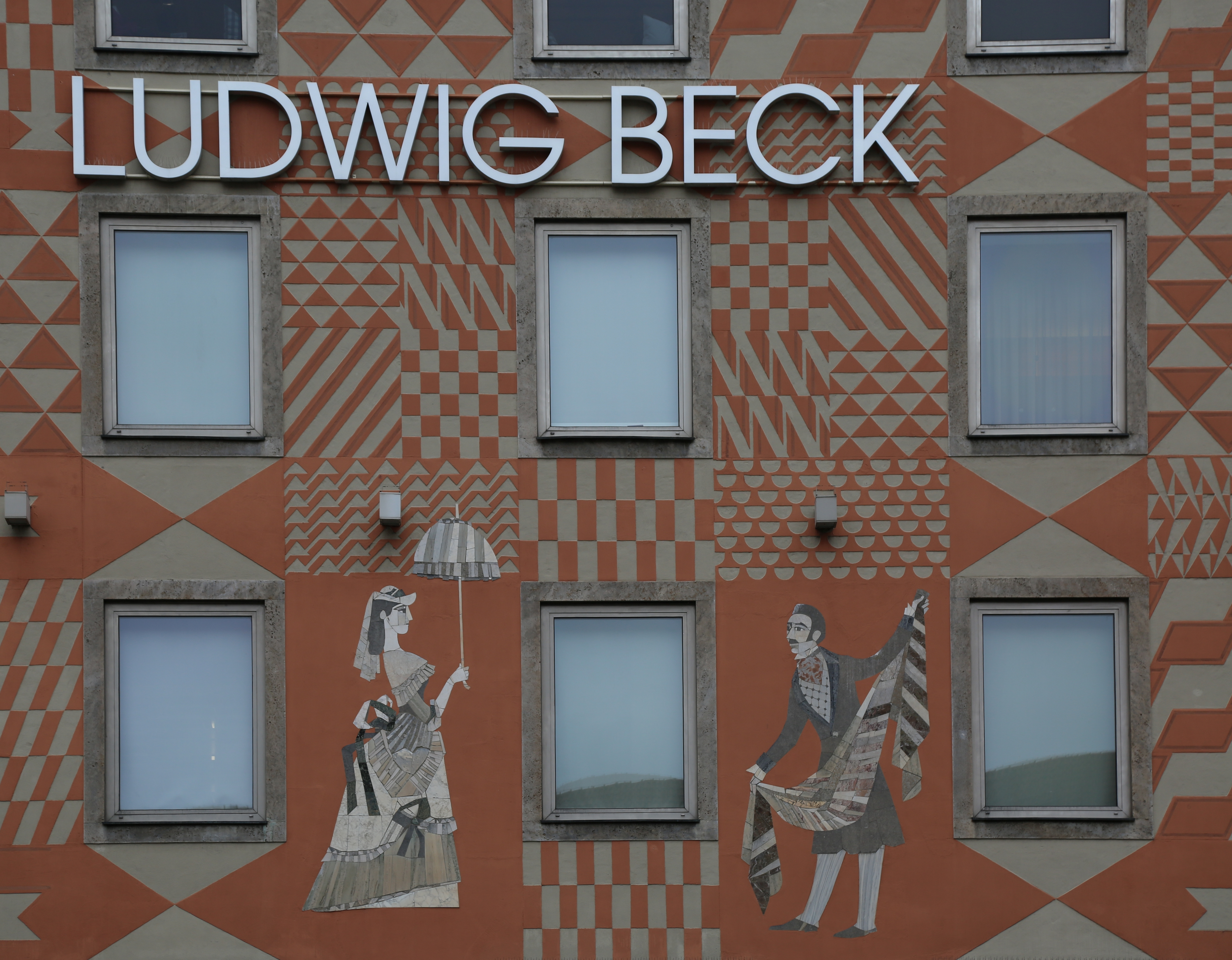 Wandgestaltung am Kaufhaus Ludwig Beck am Münchner Marienplatz. Künstler Max Lacher (1905 bis 1988) Technik: Sgraffito und Steinintarsien